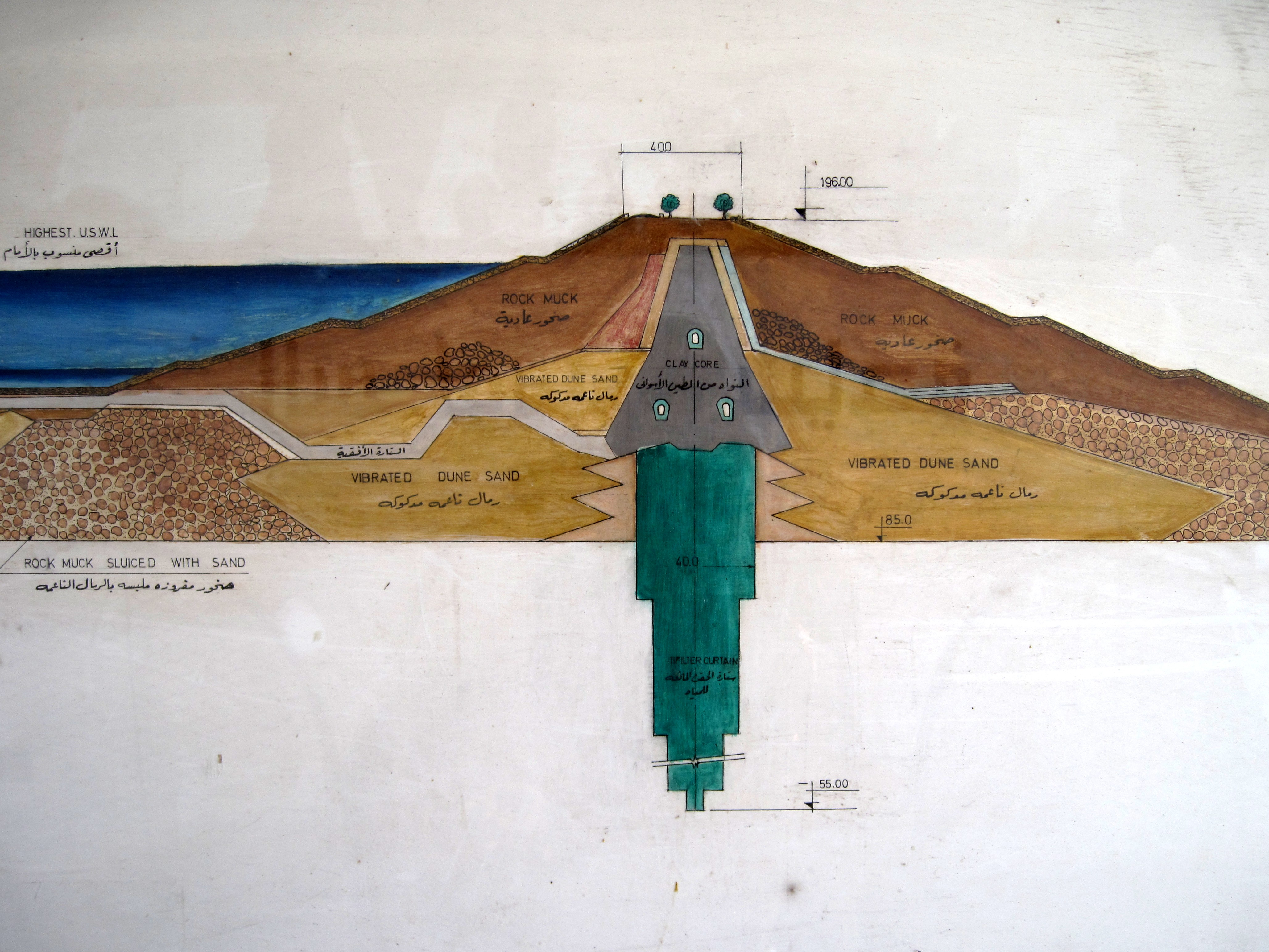 Ausschnitt einer Informationstafel auf dem Assuan-Hochdamm in Ägypten